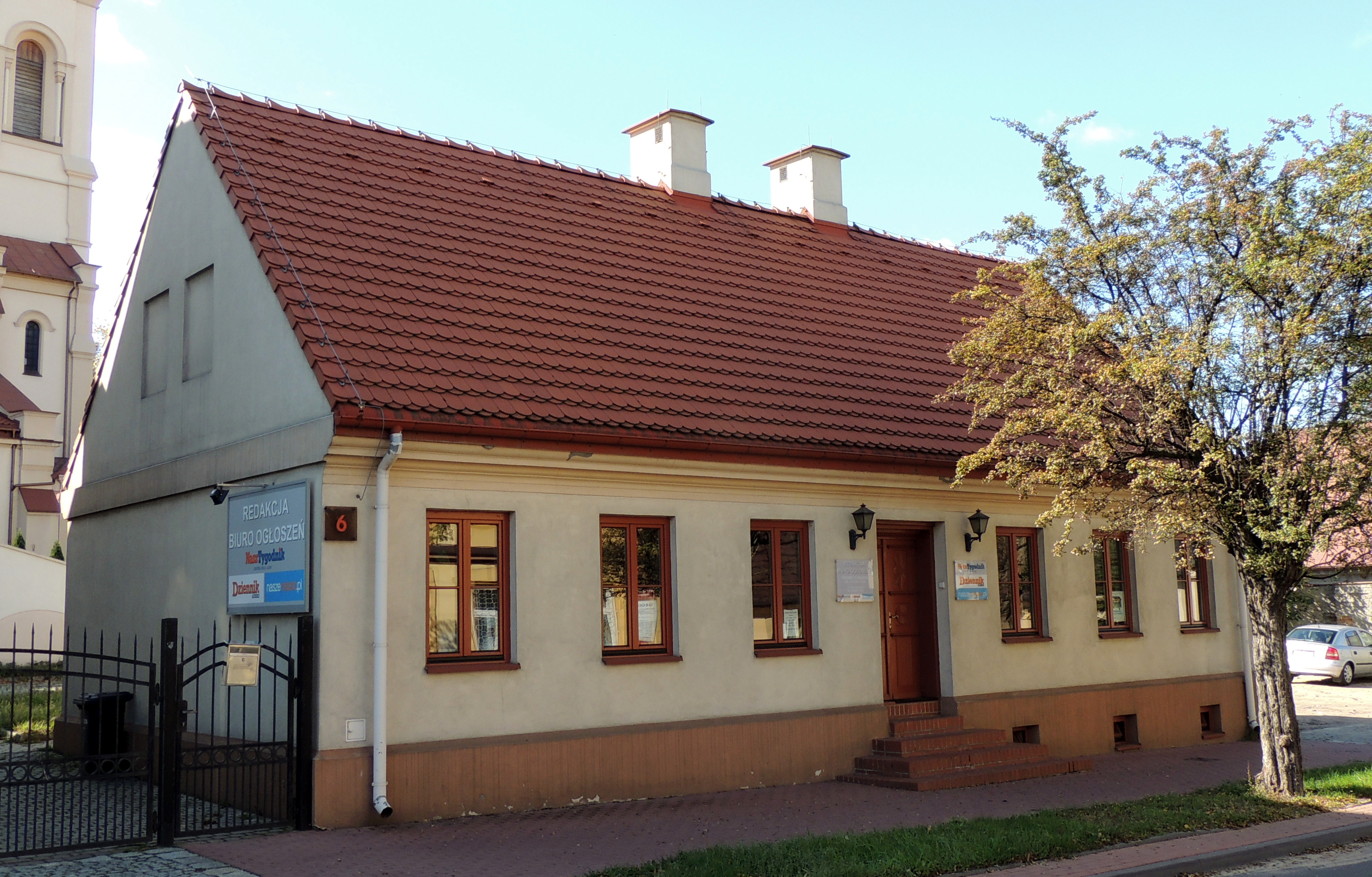 Dom, I poł. XIX w.